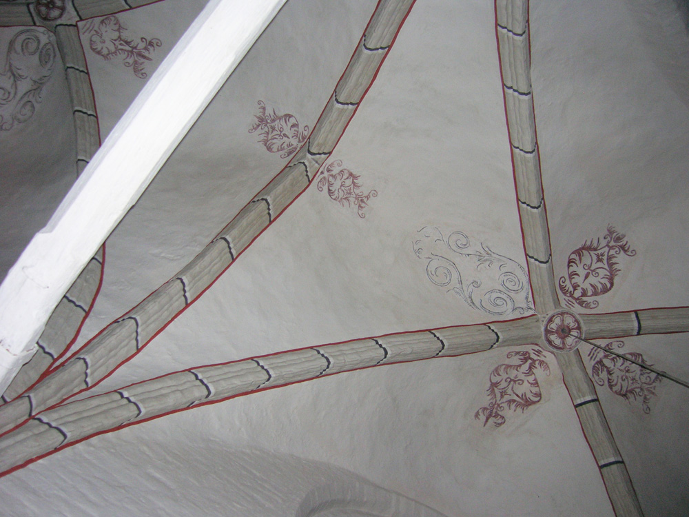 Chorgewöle der Gadebuscher Stadtkirche